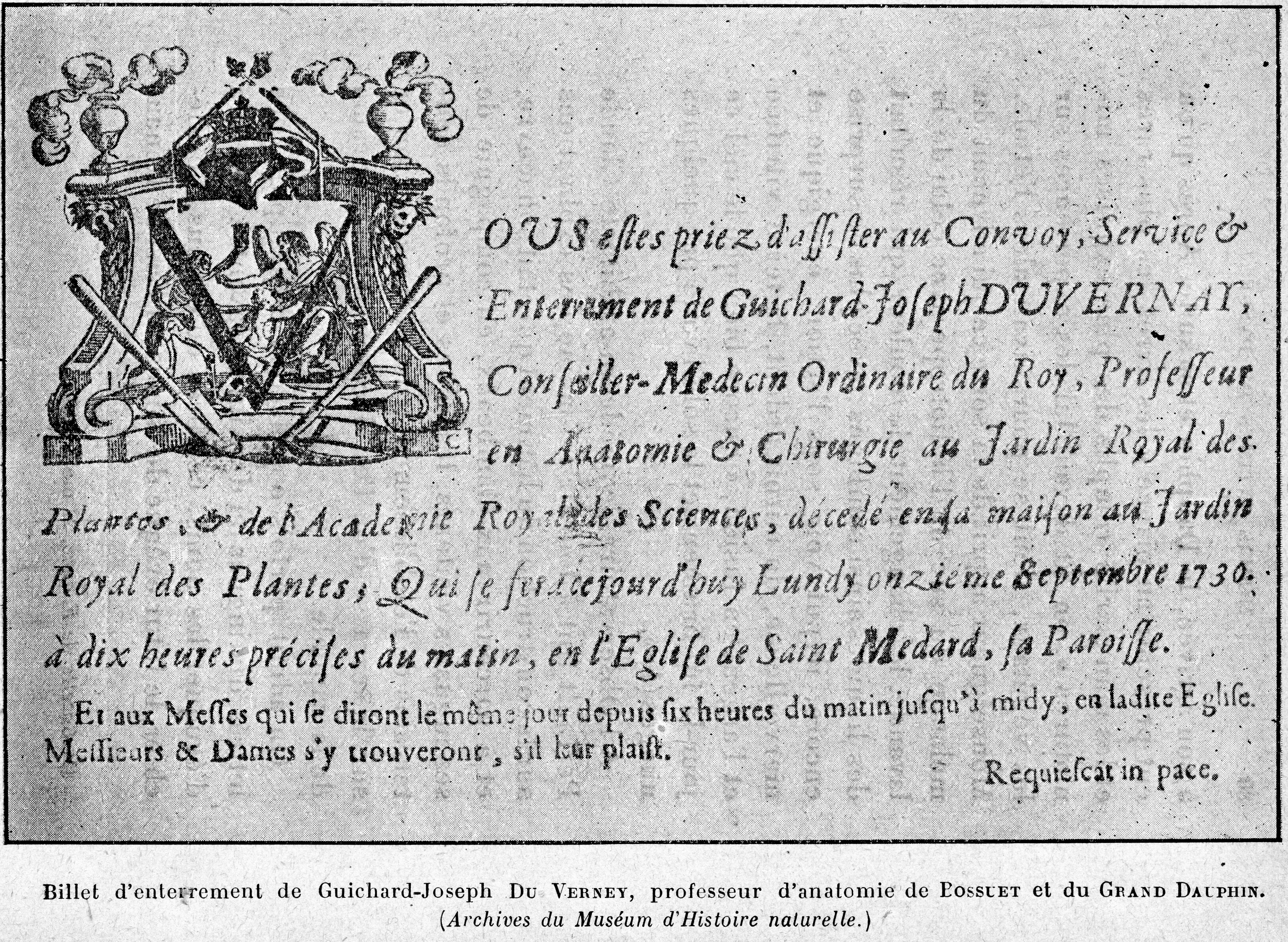 Cabanès, Éducation de Princes023 Billet d'enterrement de Guichard-Joseph Du Verney, professeur d'anatomie de Bossuet et du Grand Dauphin